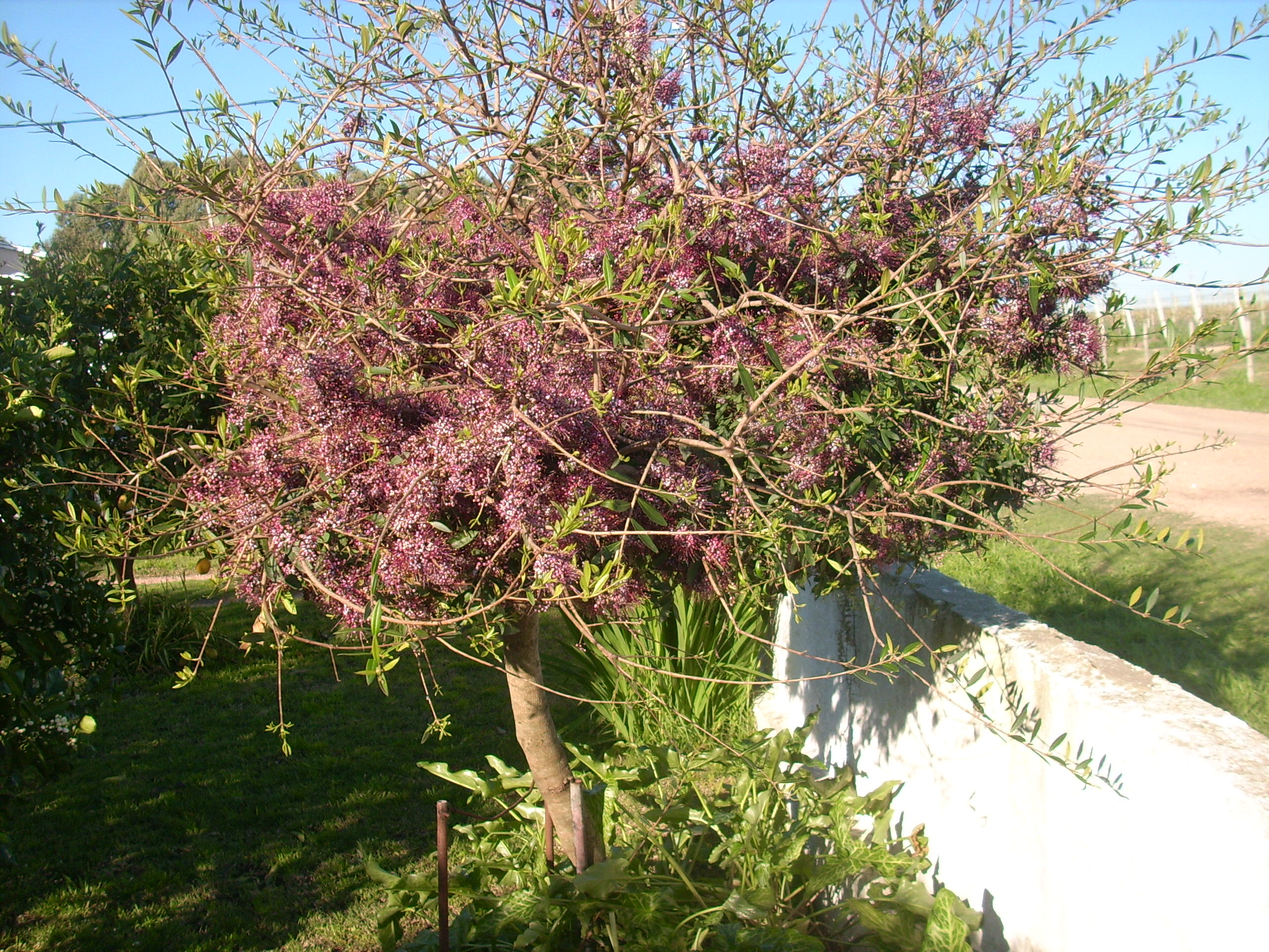 Myrrhinium atropurpureum var. octandrum, llega a ocupar casi toda su copa con flores